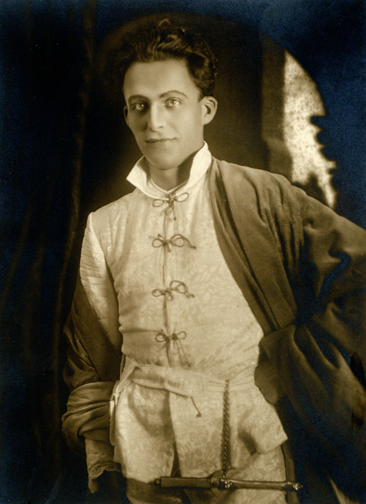 William Shakespeare, Romeo in Julija, Narodno gledališče v Ljubljani. Na fotografiji: Slavko Jan (Romeo).